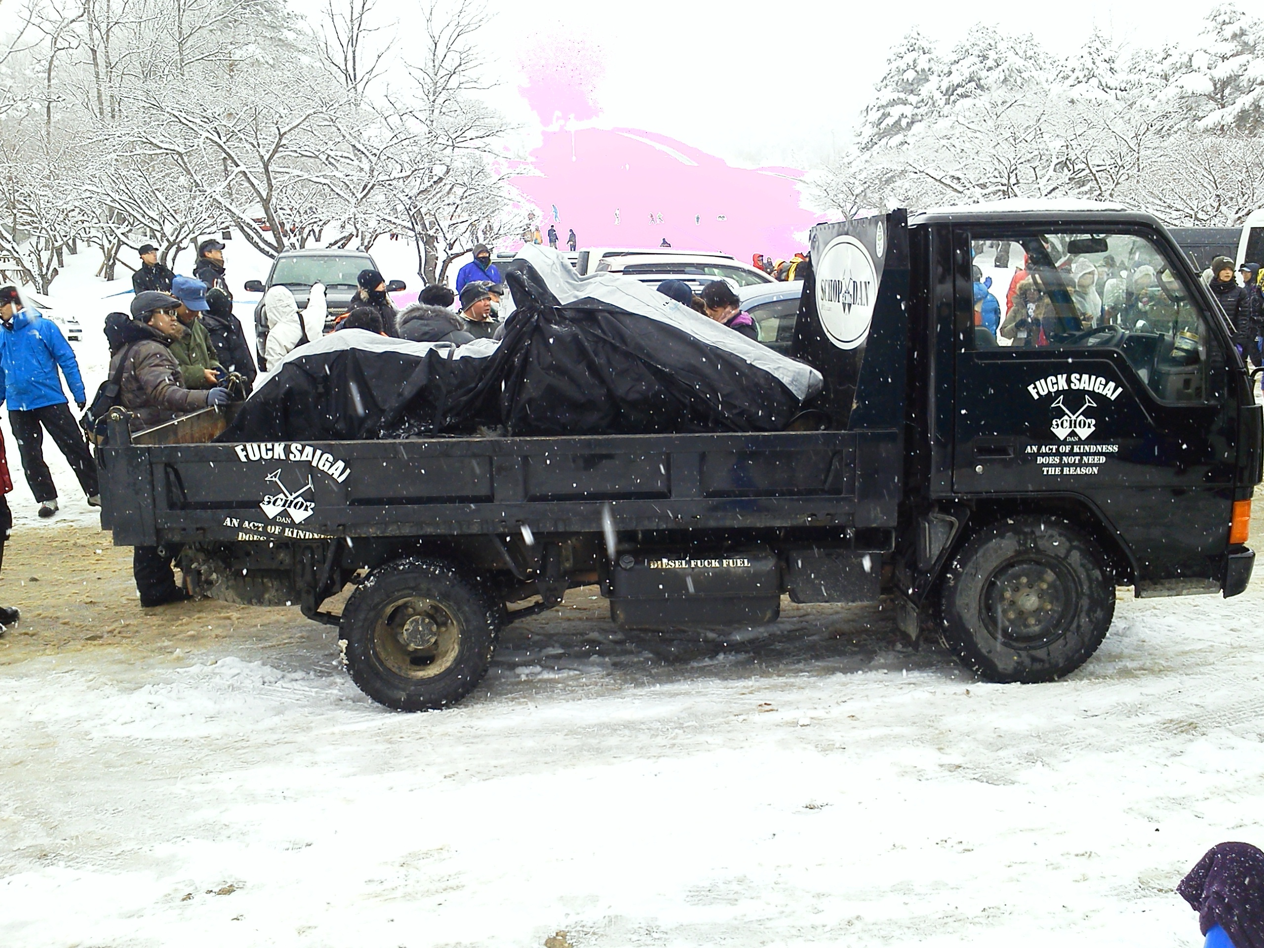 スコップ団プ 2012年3月10日撮影